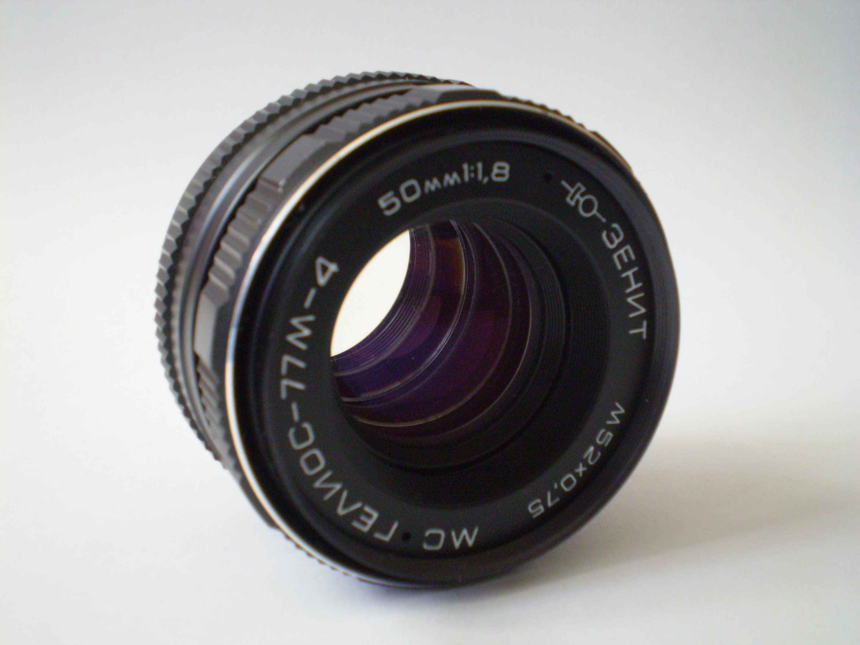 Объектив Гелиос 77М-4